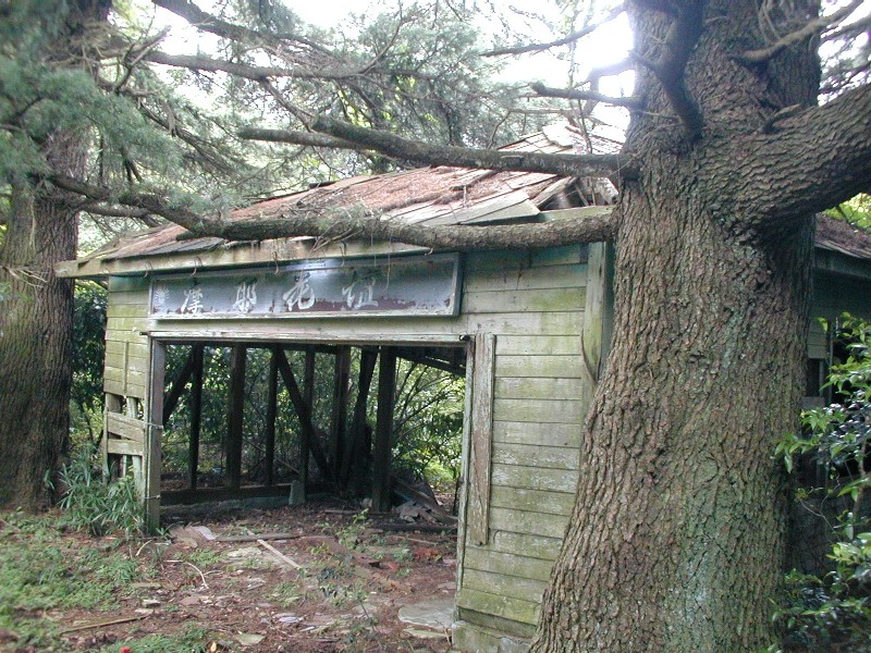 旧摩耶花壇